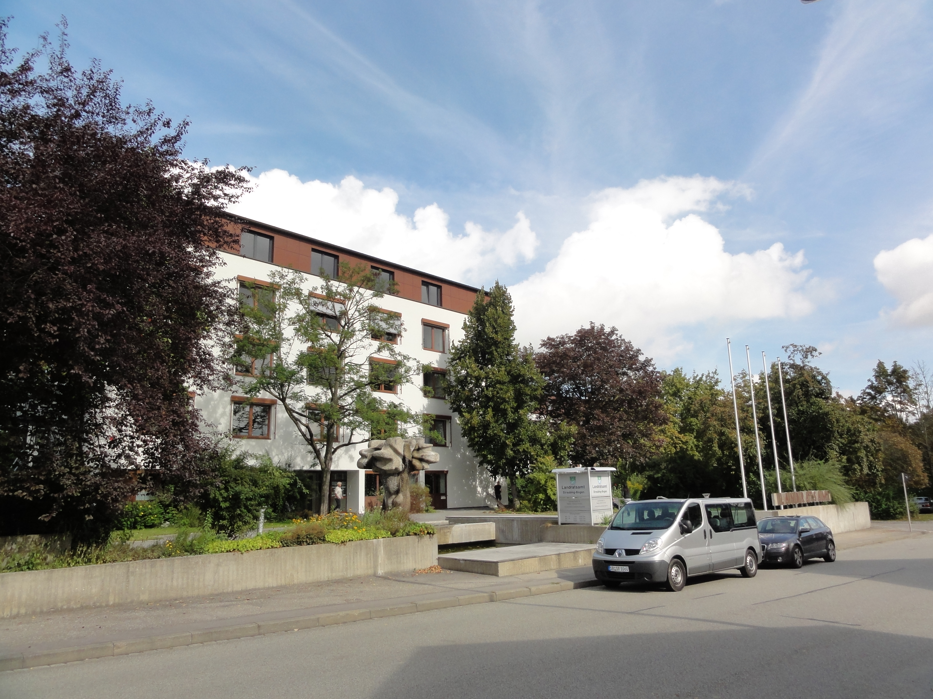 Straubing - Landratsamt Straubing-Bogen Info GPS data may be inaccurate. EXIF data regarding date and time may be inaccurate.